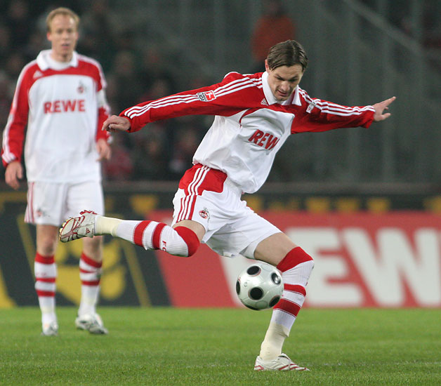 Schussbereit - Milivoje Novakovič beim Derby gegen Borussia Mönchengladbach